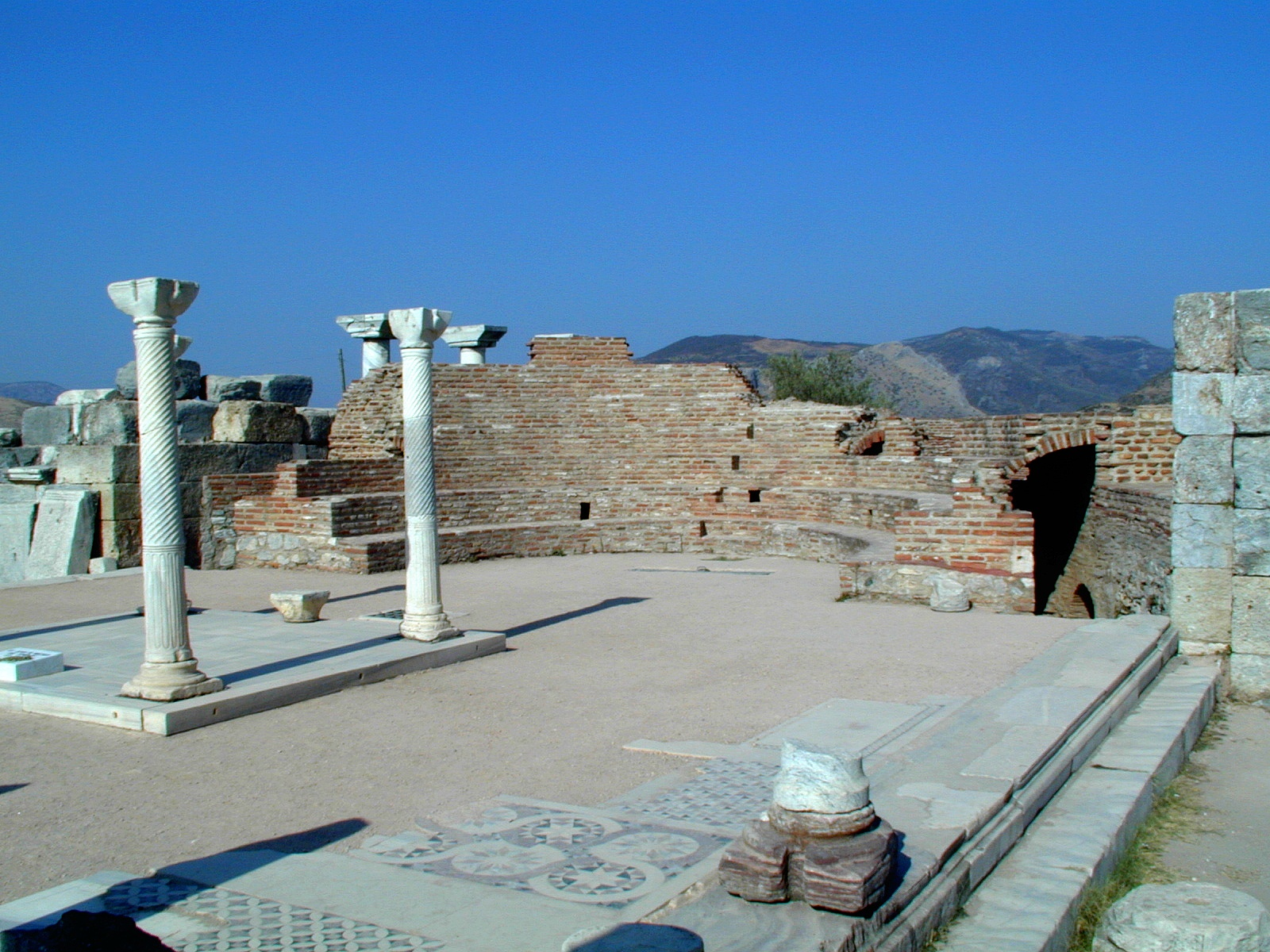 Synthronon de l'église Saint-Jean le Théologien.